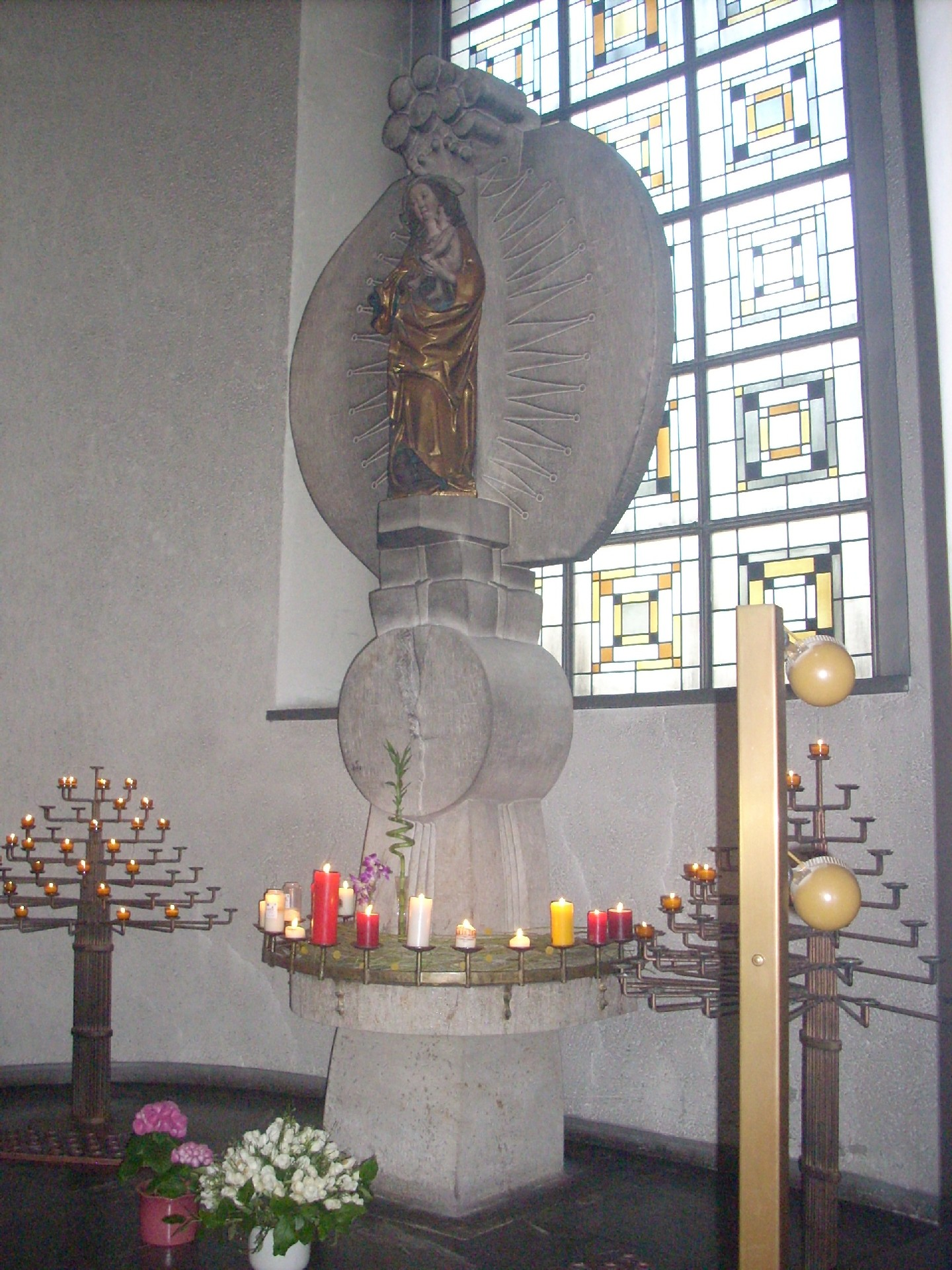 Berlin, St.-Hedwigs-Kathedrale, Marienstele